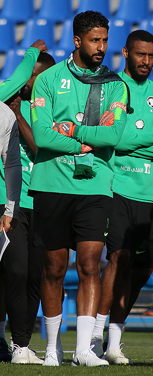 Сборная Саудовской Аравии потренировалась в Петербурге